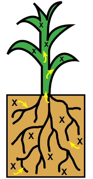 Fitoremediació